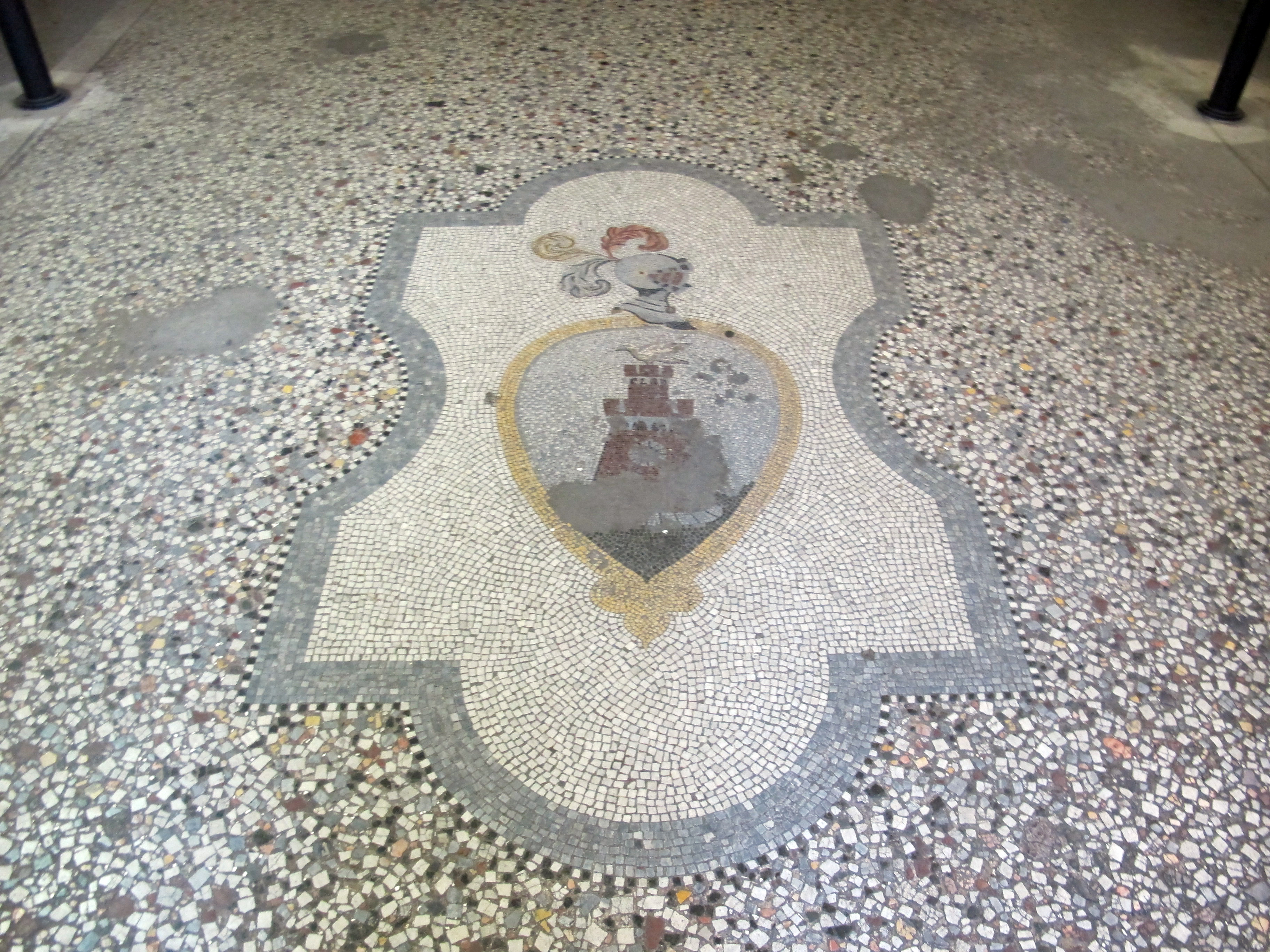 Piazza salvemini, palazzo bartolommei, androne